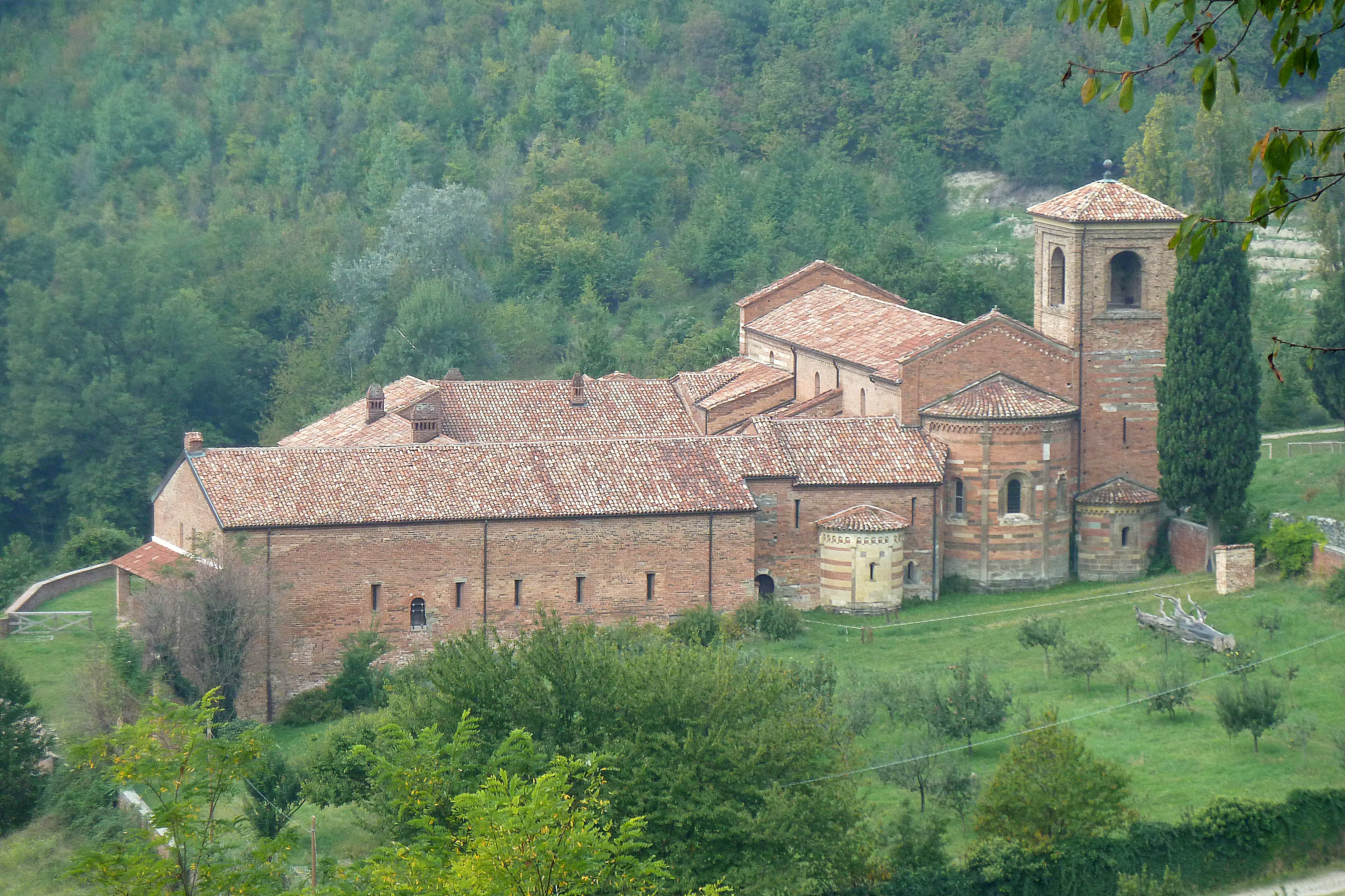 Abtei Vezzolano-Albugnano